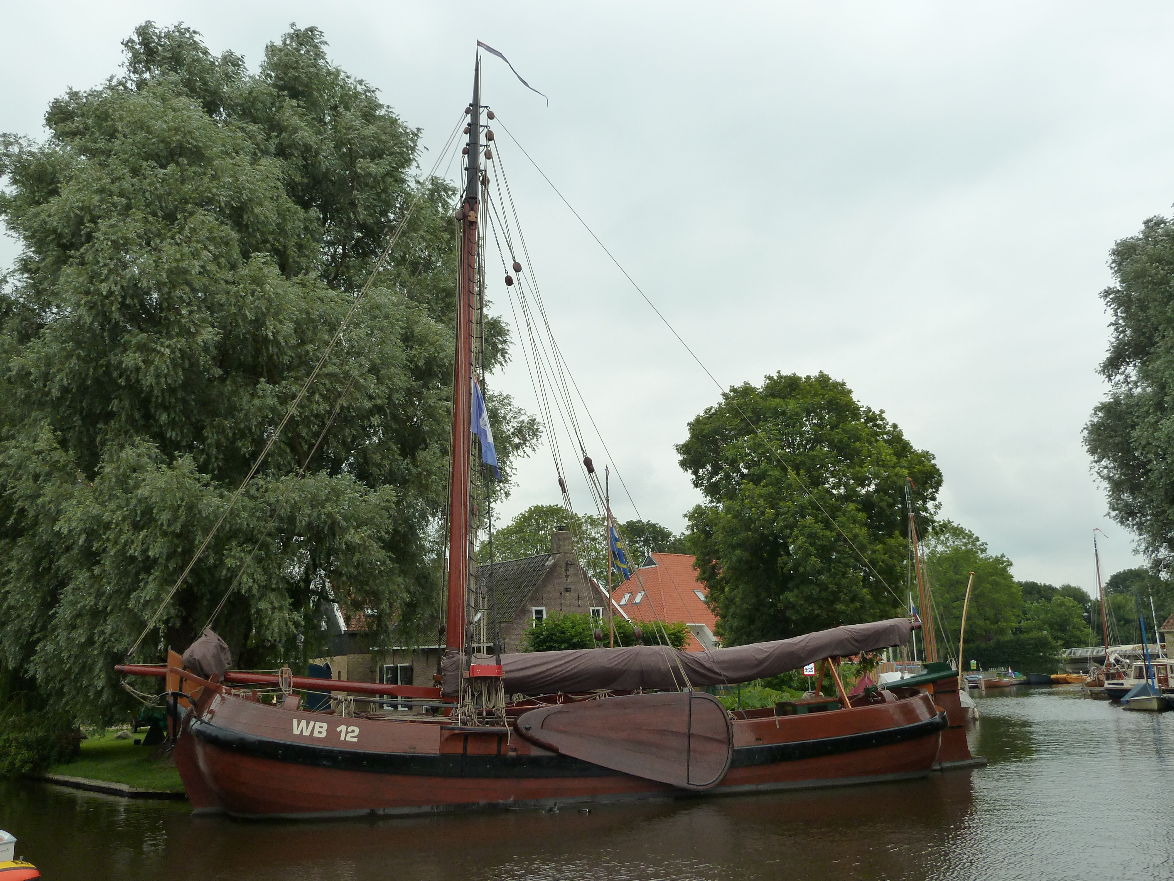 Heeg: Palingaak Korneliske Ykes II (WB 12)